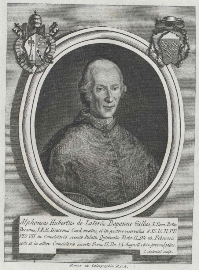 Portrait d'Alphonse-Hubert de Latier de Bayane (1739-1818), cardinal(1801).